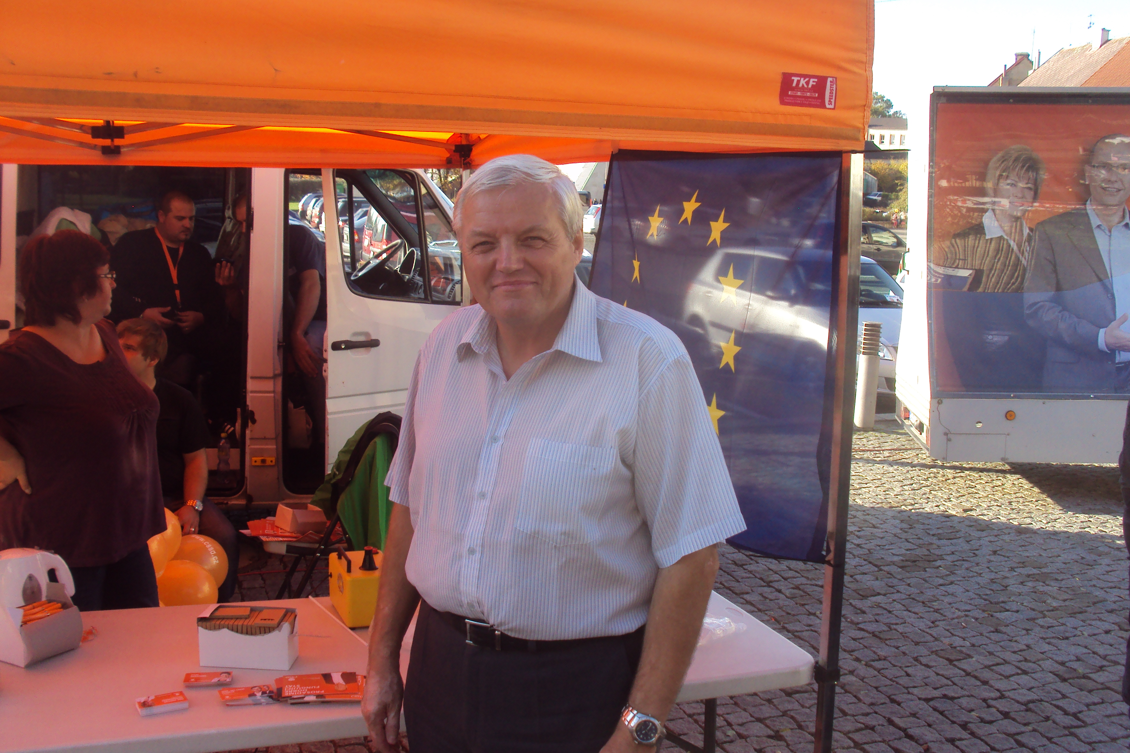 Politik Kapoun, předvolební mítink ČSSD, Česká Lípa říjen 2013